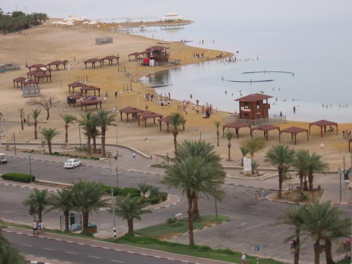 תצפית לעבר חוף ים המלח